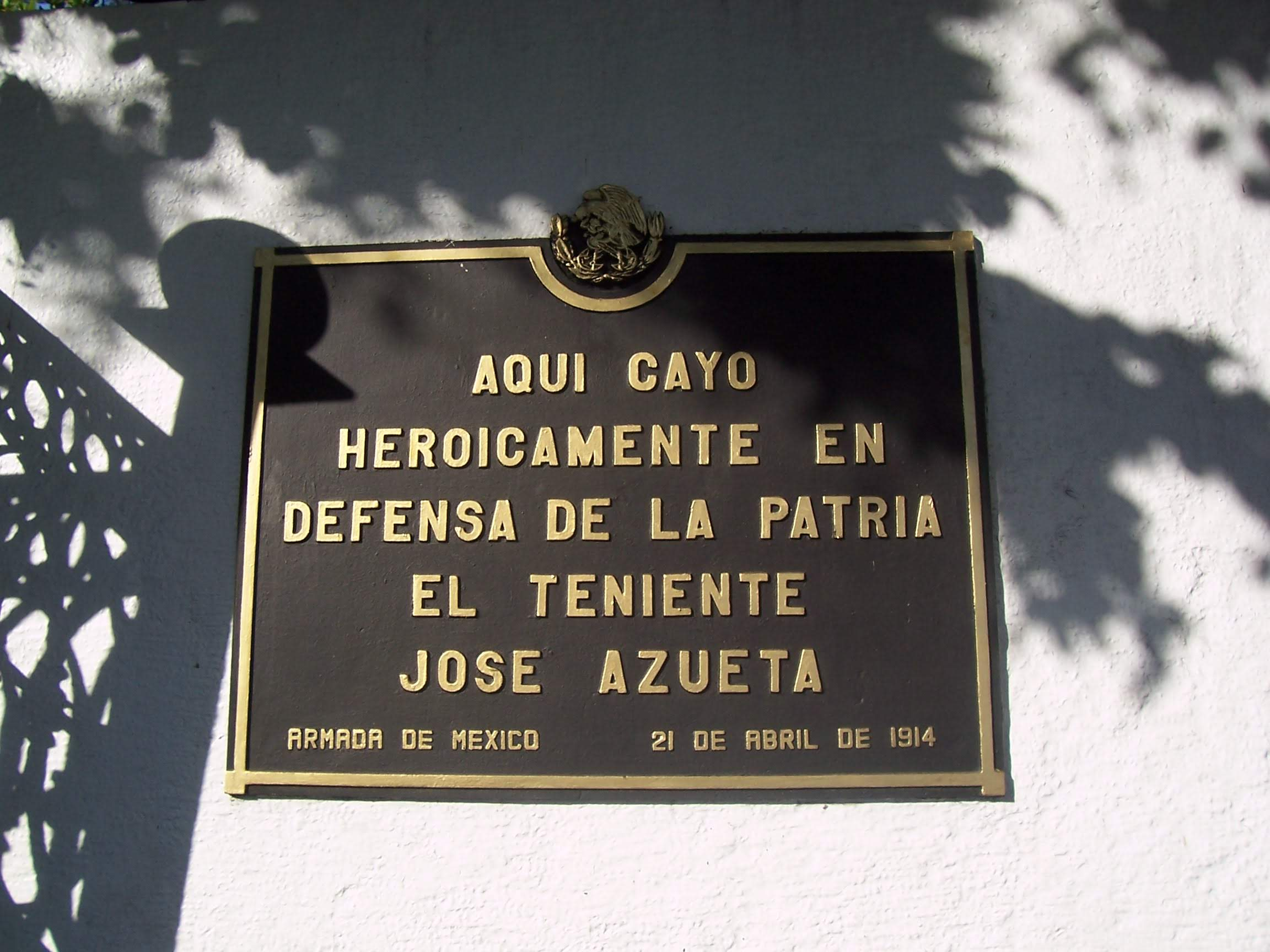 Placa conmemorativa, Armada de Mexico